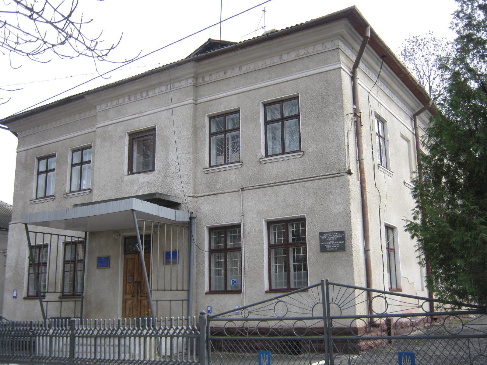 Дім д-ра Володимира Гамерського. Бучач, 26-10-2019